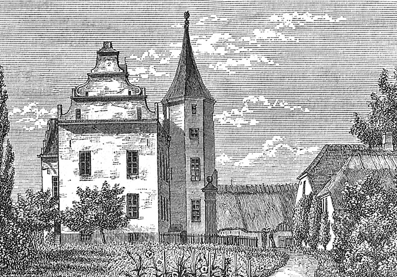 Skovsbo er en herregård, som nævnes første gang i 1369. Gården ligger i Rynkeby Sogn, Bjerge Herred, Kerteminde Kommune. Hovedbygningen er opført i 1572-1579 og tilbygget i 1881 ved August Klein.